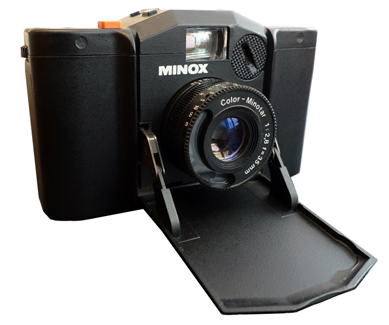 Appareil Photographique Minox 35 GL